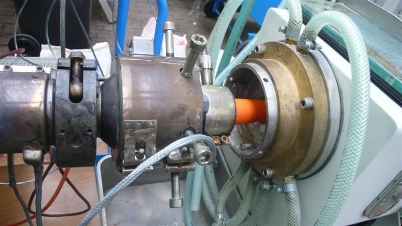 Boarisch: Rohrdüse mit Kalibrierung und orangem Rohr